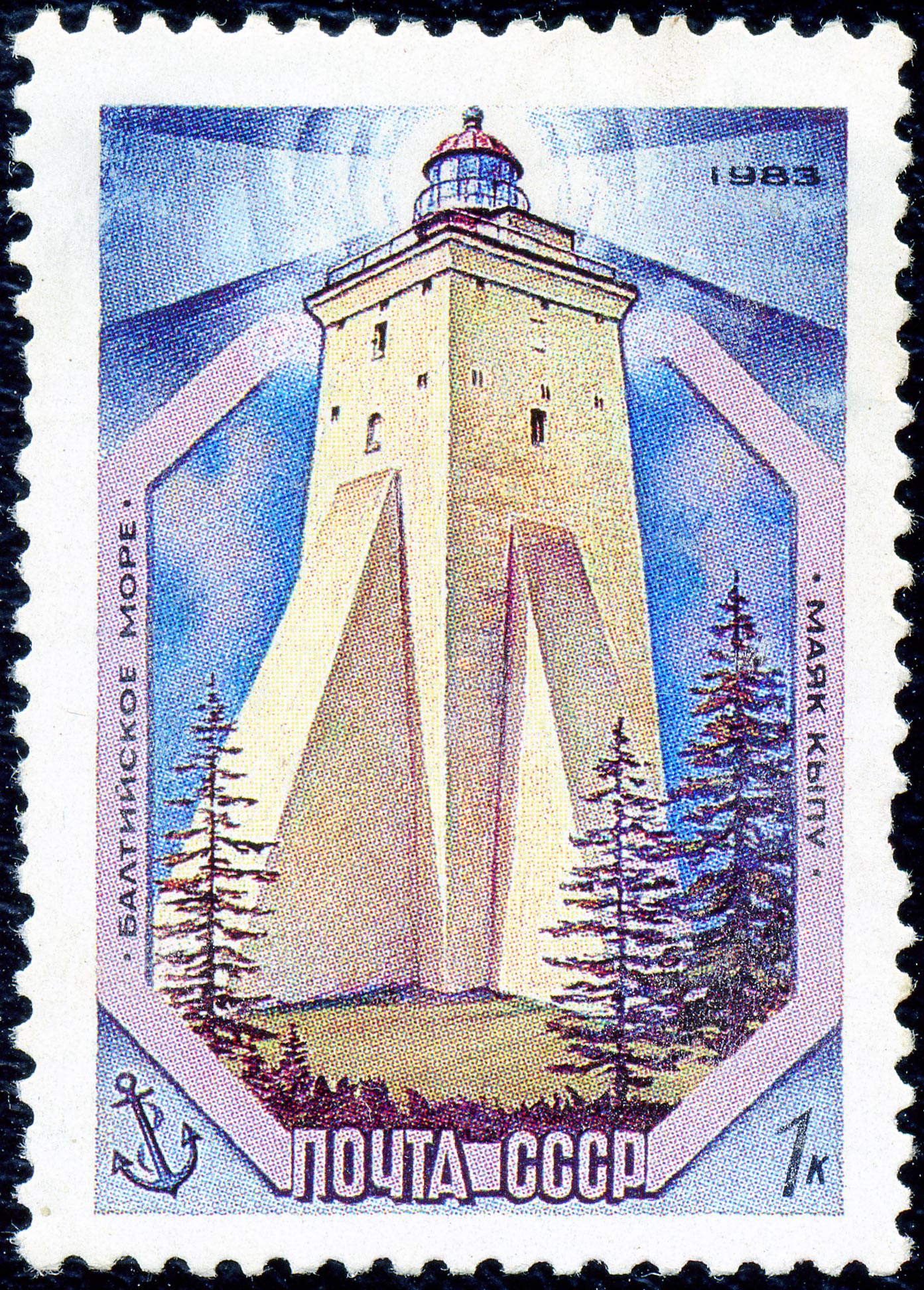 Почтовая марка СССР. 1983. Балтийское море. Маяк Кыпу